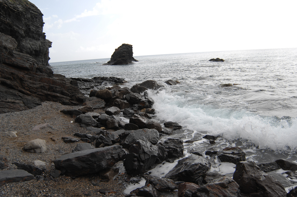 Прибой